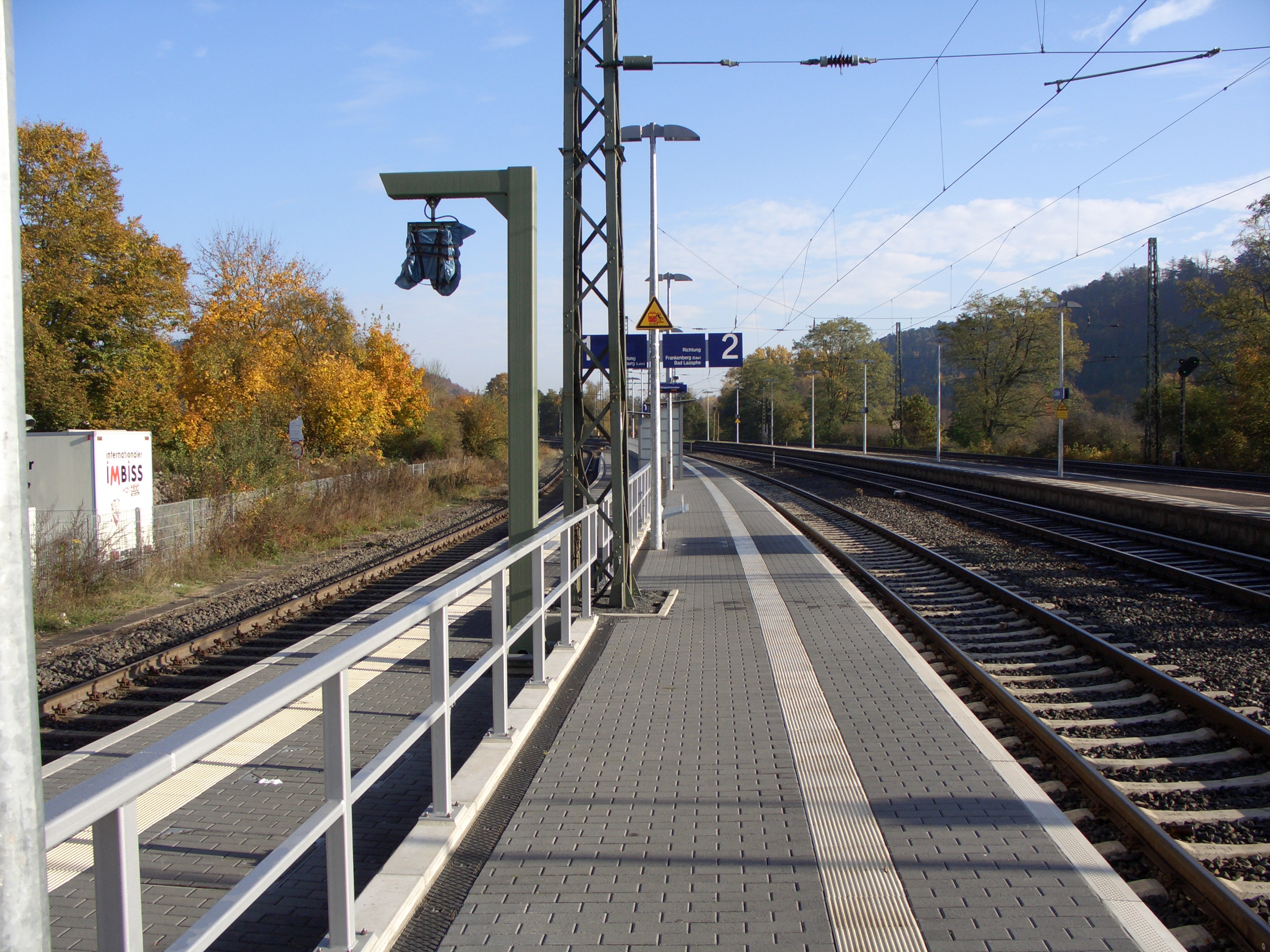 Der Bahnsteig der Gleise 1 und 2 in Richtung Norden. Rechts der Bahnsteig der Gleise 3 und 4.